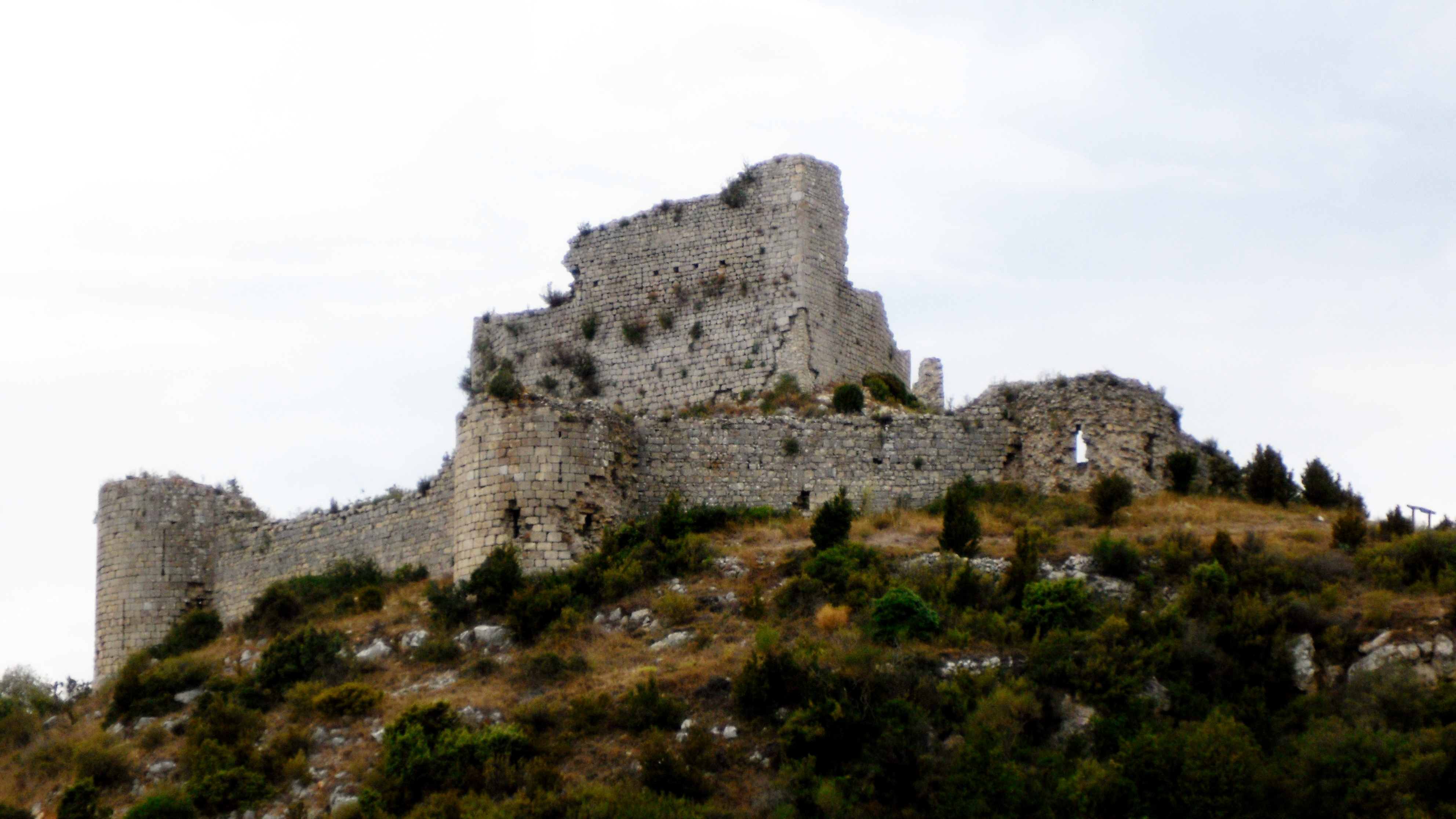 Fort d'Aguilar à Tuchan (Aude)